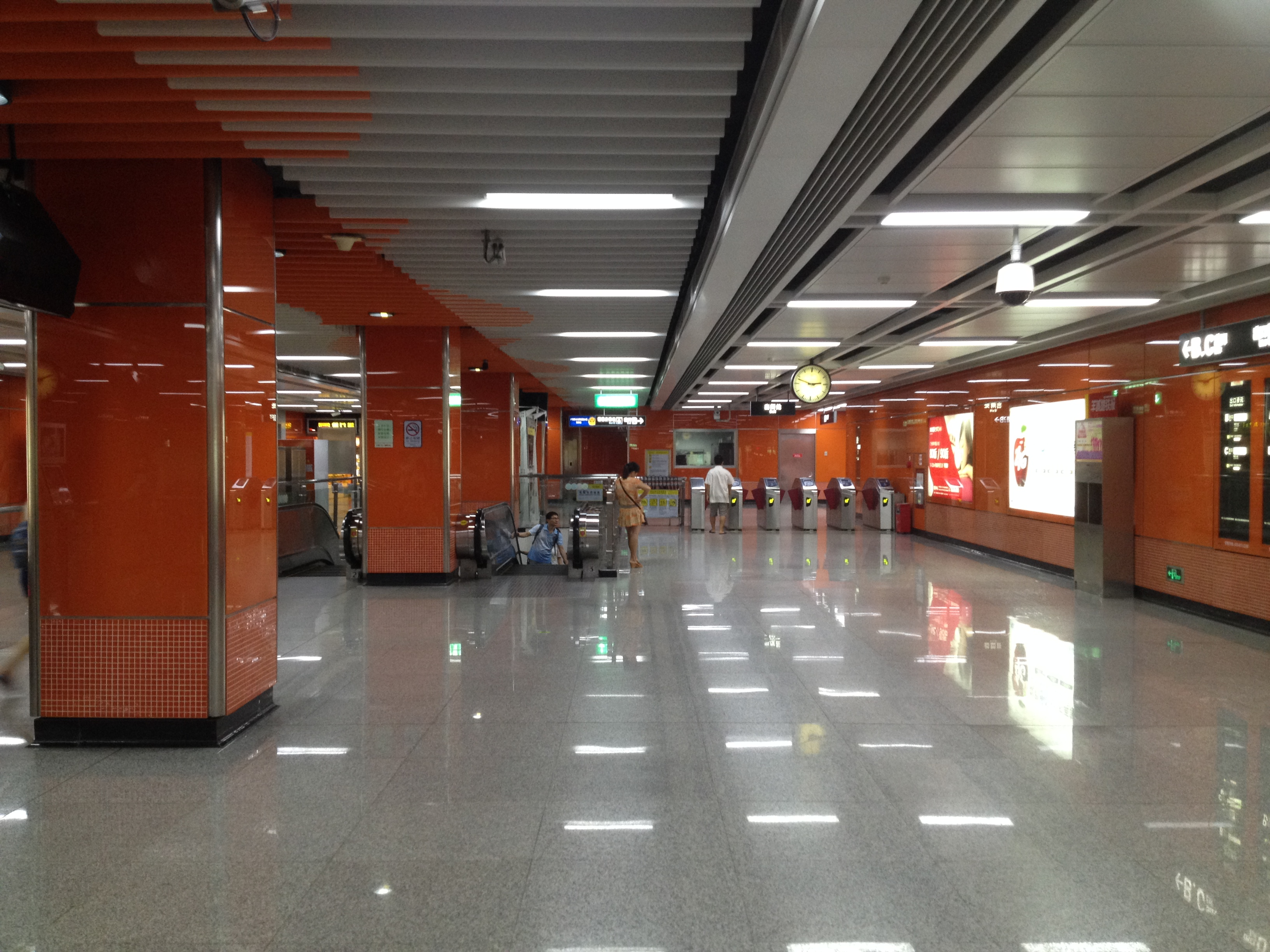 广州地铁官洲站站厅